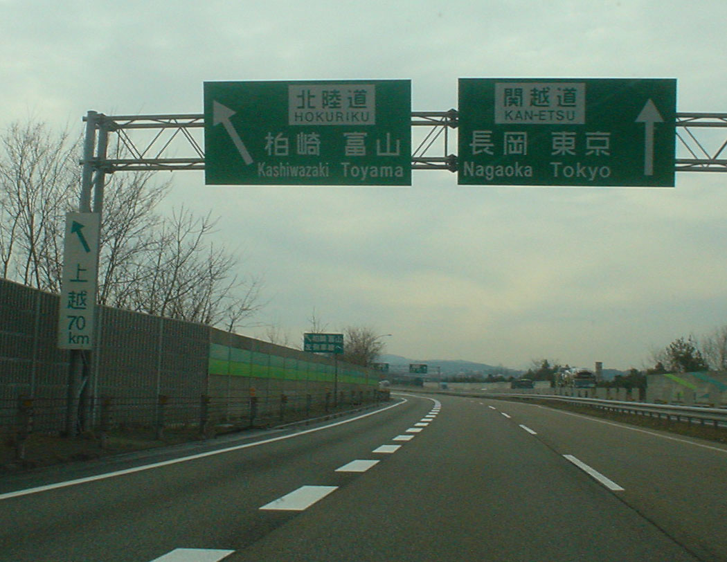 長岡ジャンクション 新潟県長岡市 新潟方面より案内標識を撮影